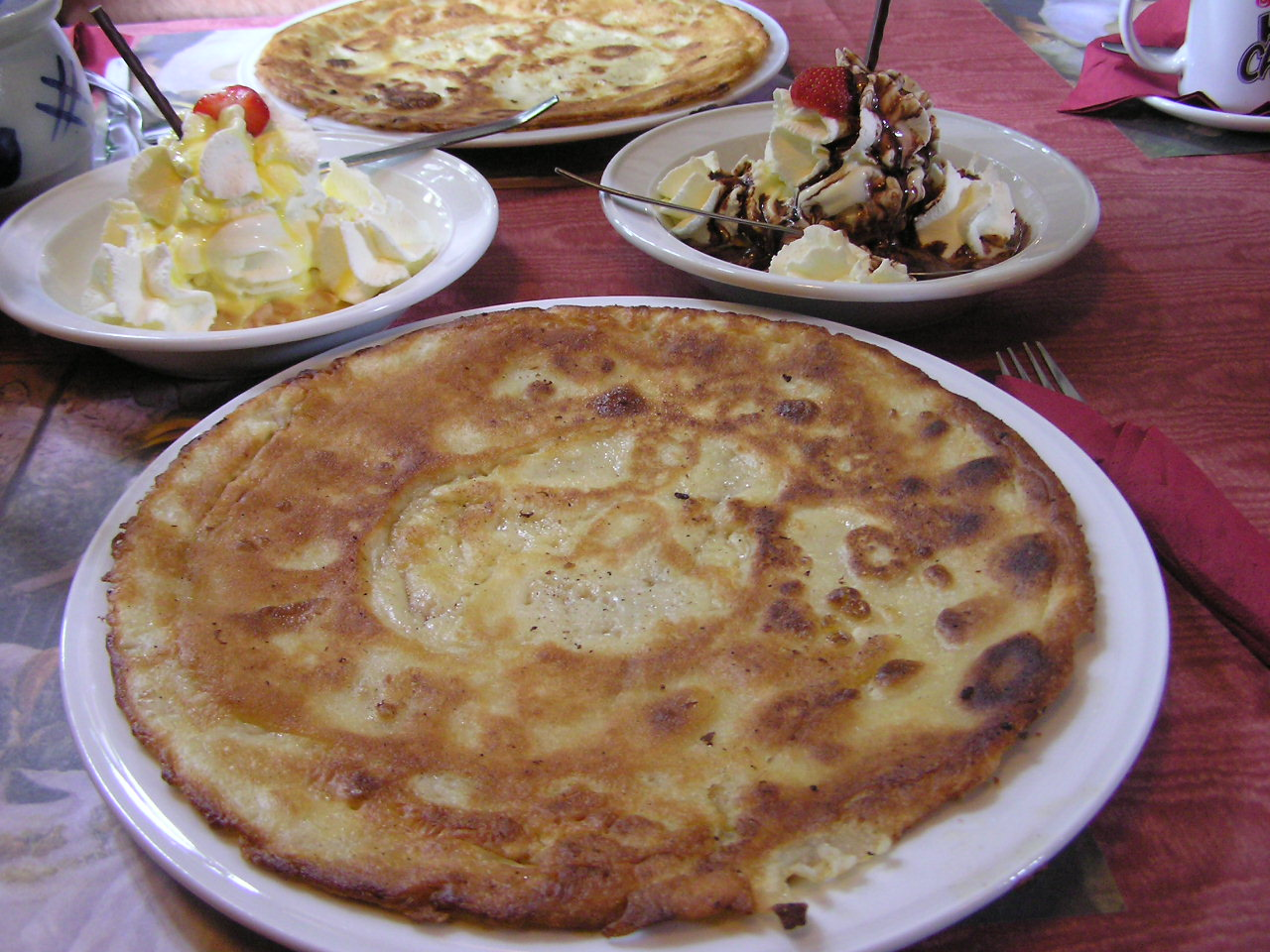 Pannenkoeken (almost the same as pancakes).